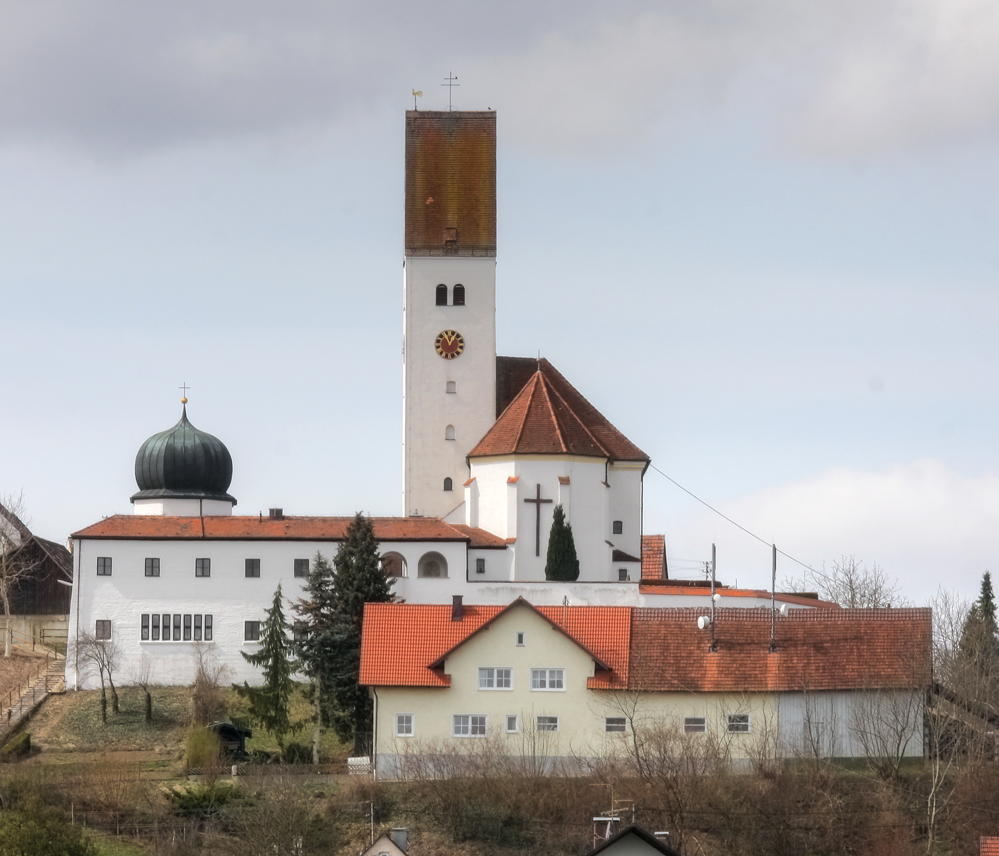 Burtenbach-Kemnat, Pfarrkirche St. Georg, Bauzeit: 1945–1949 Architekt: Dominikus Böhm